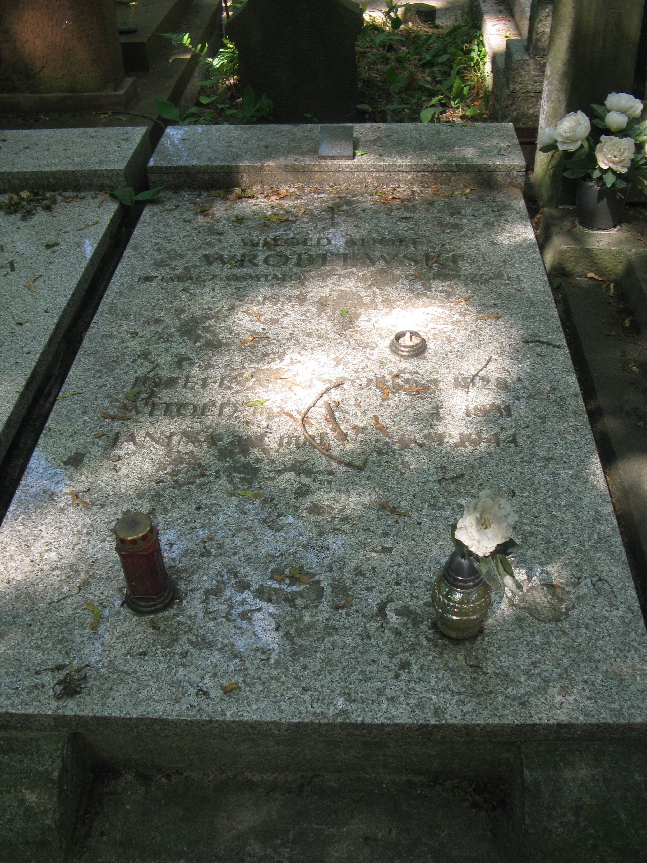 Grób pl: na Cmentarzu Powązkowskim